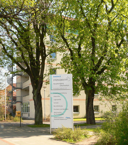 Stephansstift